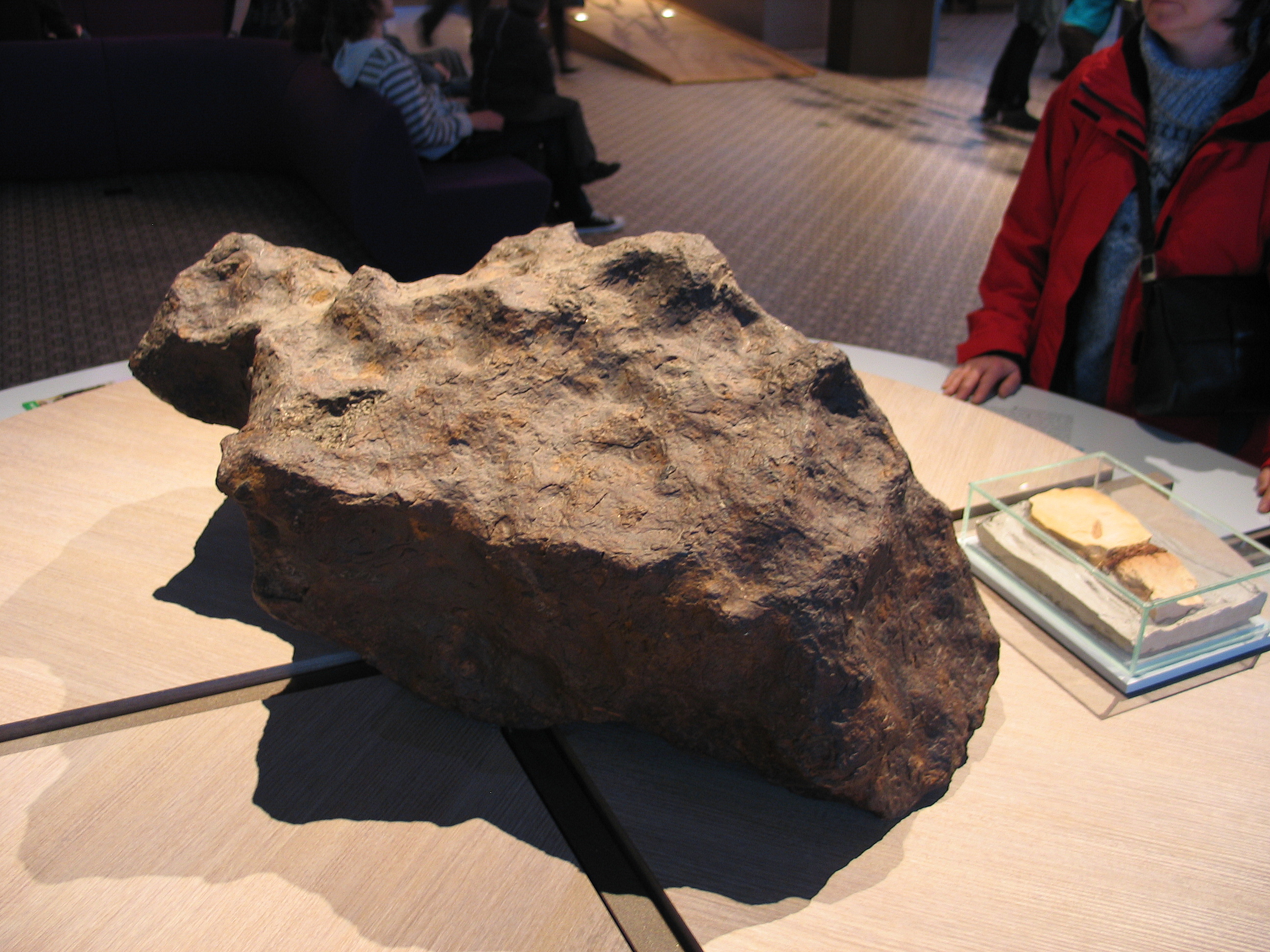 Mont Dieu meteorite at the Museum voor Natuurwetenschappen in Brussels, Belgium